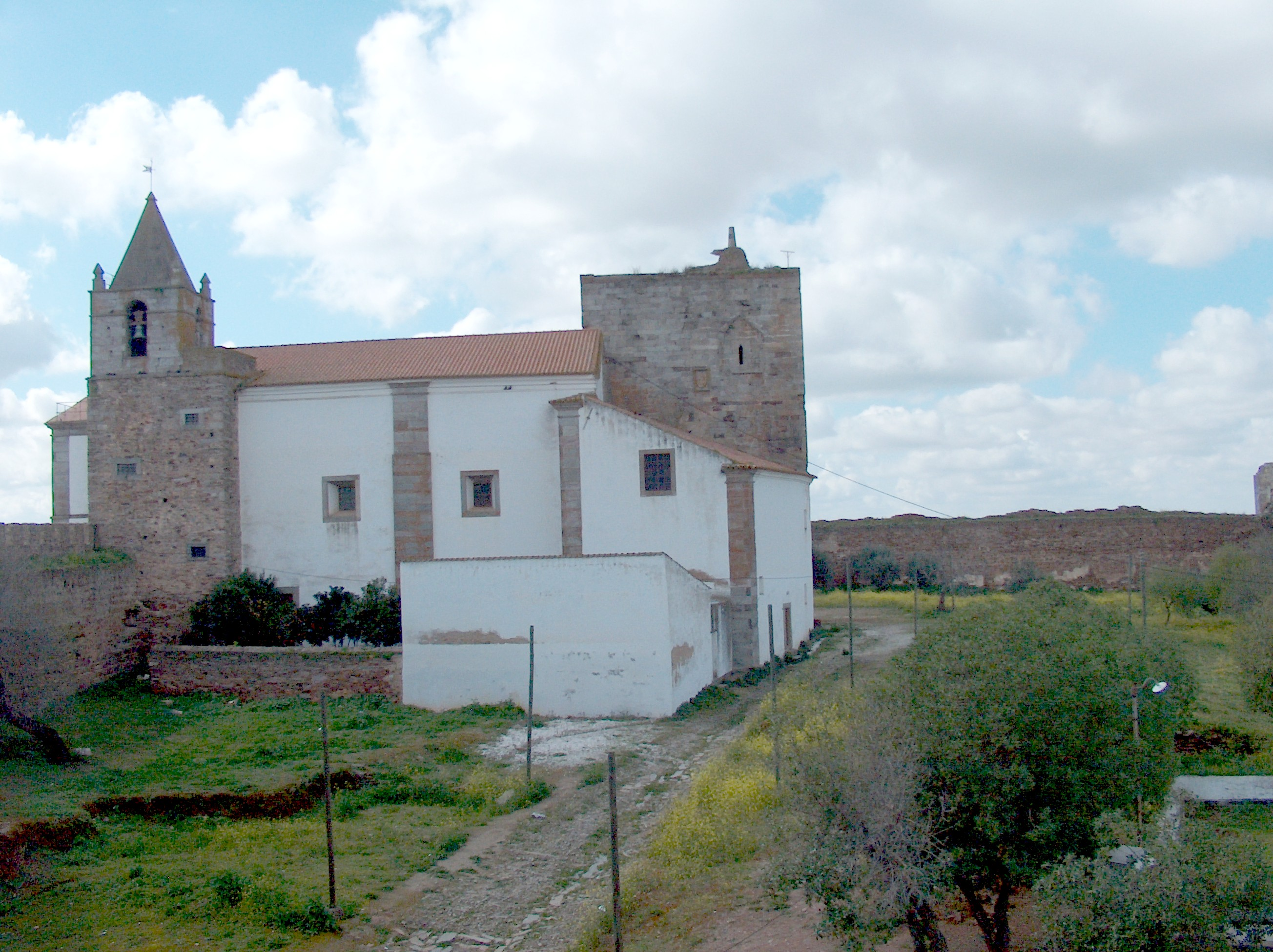 Castelo de Mourão,(freguesia e concelho de Mourão, distrito de Évora).